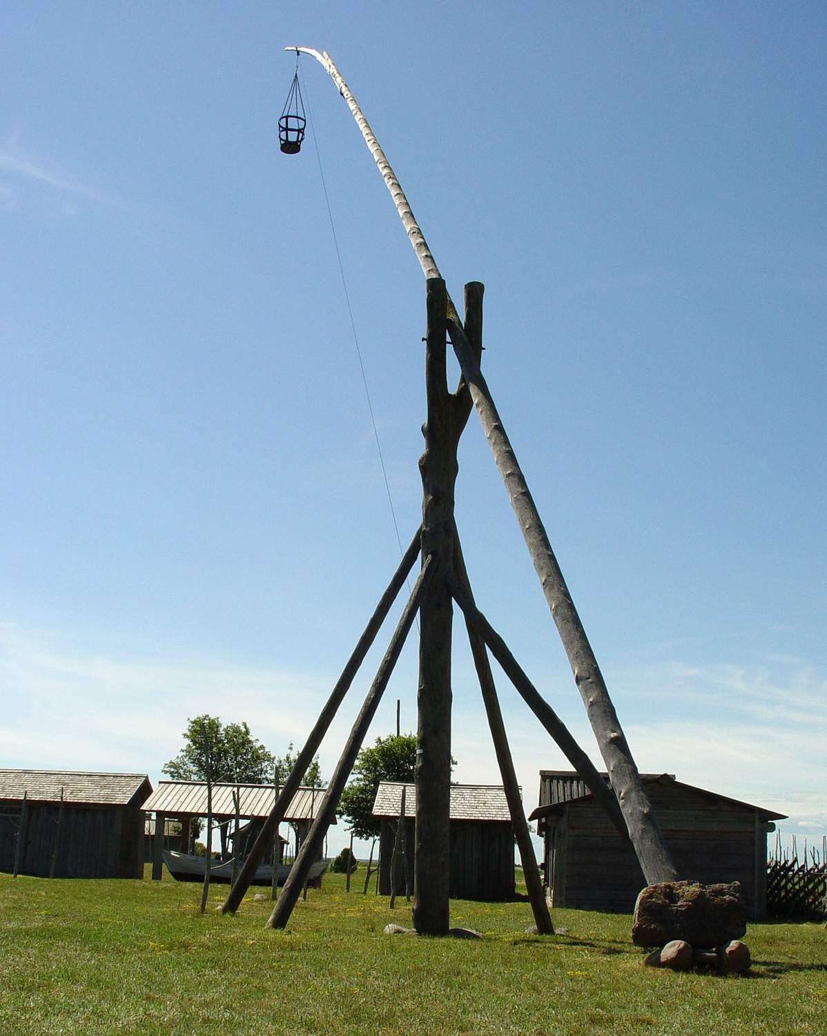 Fischerstelle auf Gotland: Fischerdorf Kovik. Museumsanlage, 4 km nördlich Klintehamn. Hütten und Leuchtfeuer